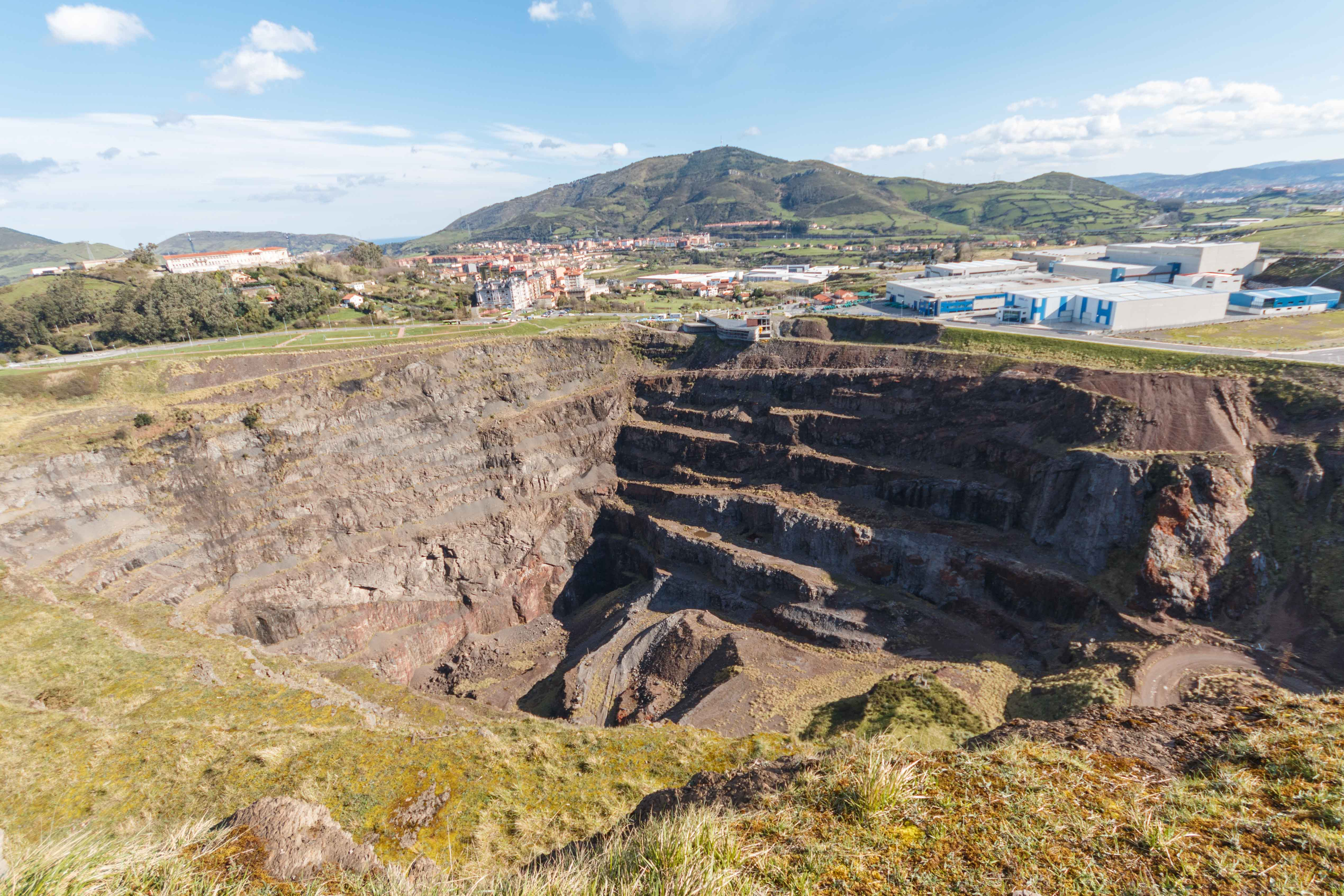 Bodavalle meategiko galeriaren ahoa